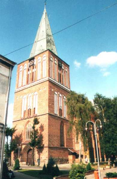 Drawsko Pomorski (Dramburg) in Polen (Poland): Kirche / Church